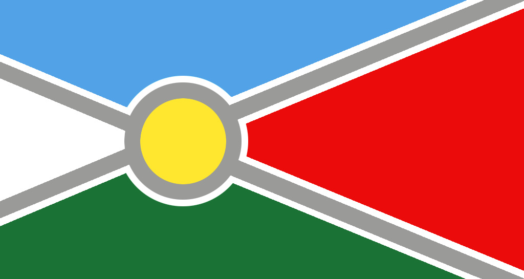 Bandera del municipio de Basavilbaso